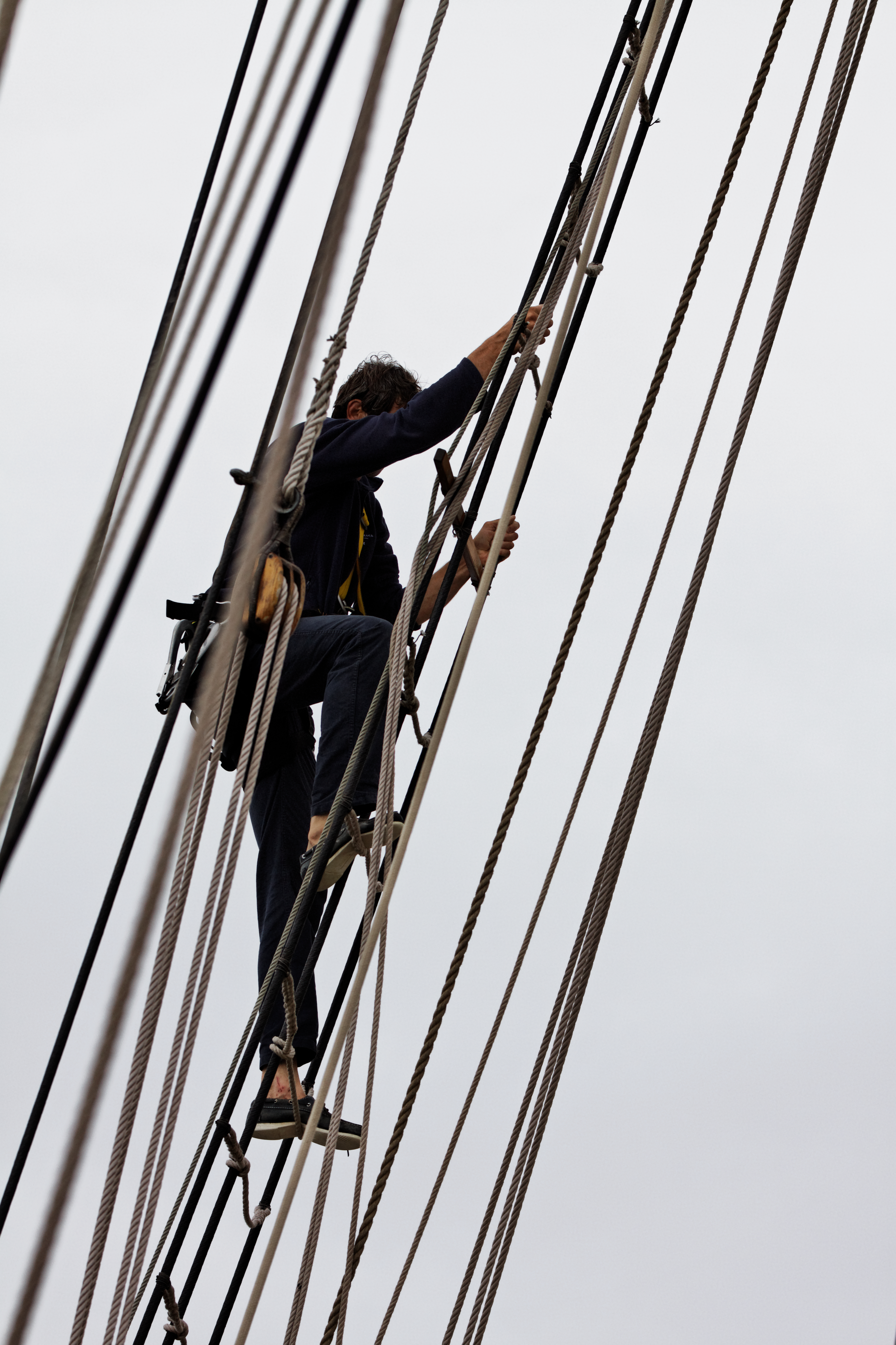 Le gabier de la Recouvrance lors des Tonnerres de Brest 2012.